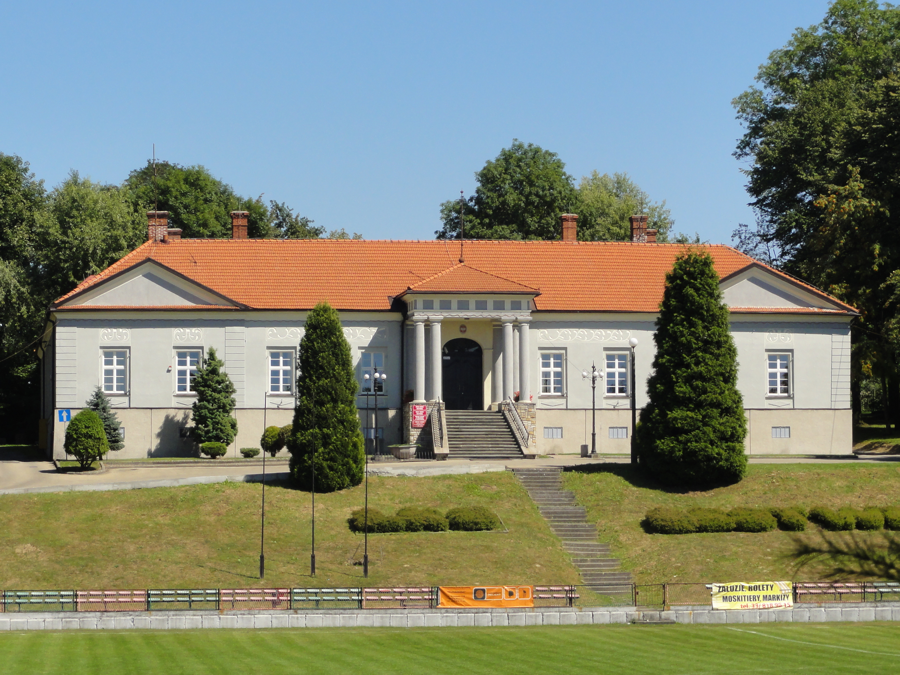 Pałac Habsburgów w Bestwinie